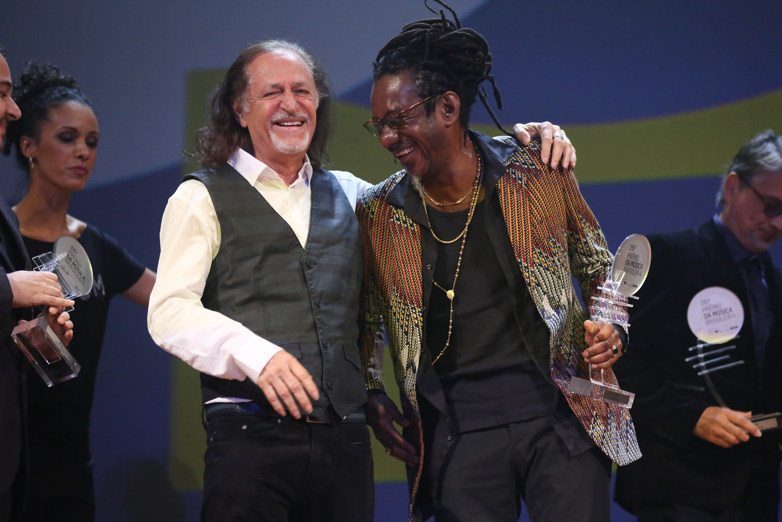 Alceu Valenca e Luiz Melodia - 26° Prêmio da Música Brasileira 2015, no Theatro Municipal, no Centro do Rio de Janeiro/RJ. (10/06/15) Foto: Roberto Filho/Divulgacão